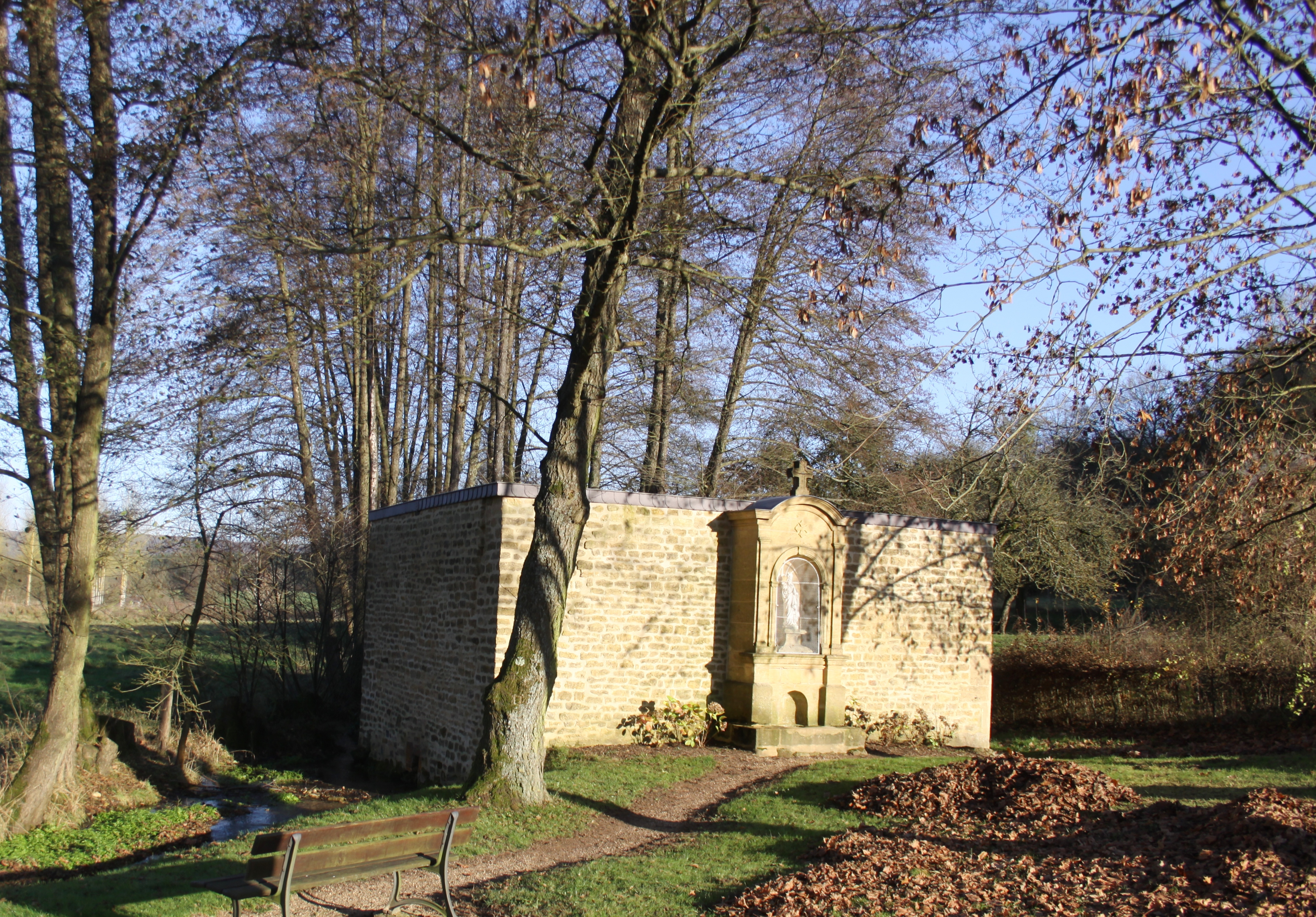 Lavoir à Saint-Aignan (Ardennes, France) .